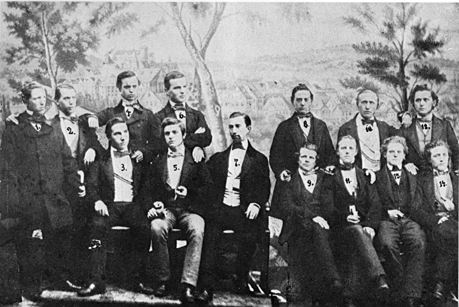 Die Stifter der Akademischen Verbindung Guestfalia in Tübingen (Fotomontage, Albuminabzug)